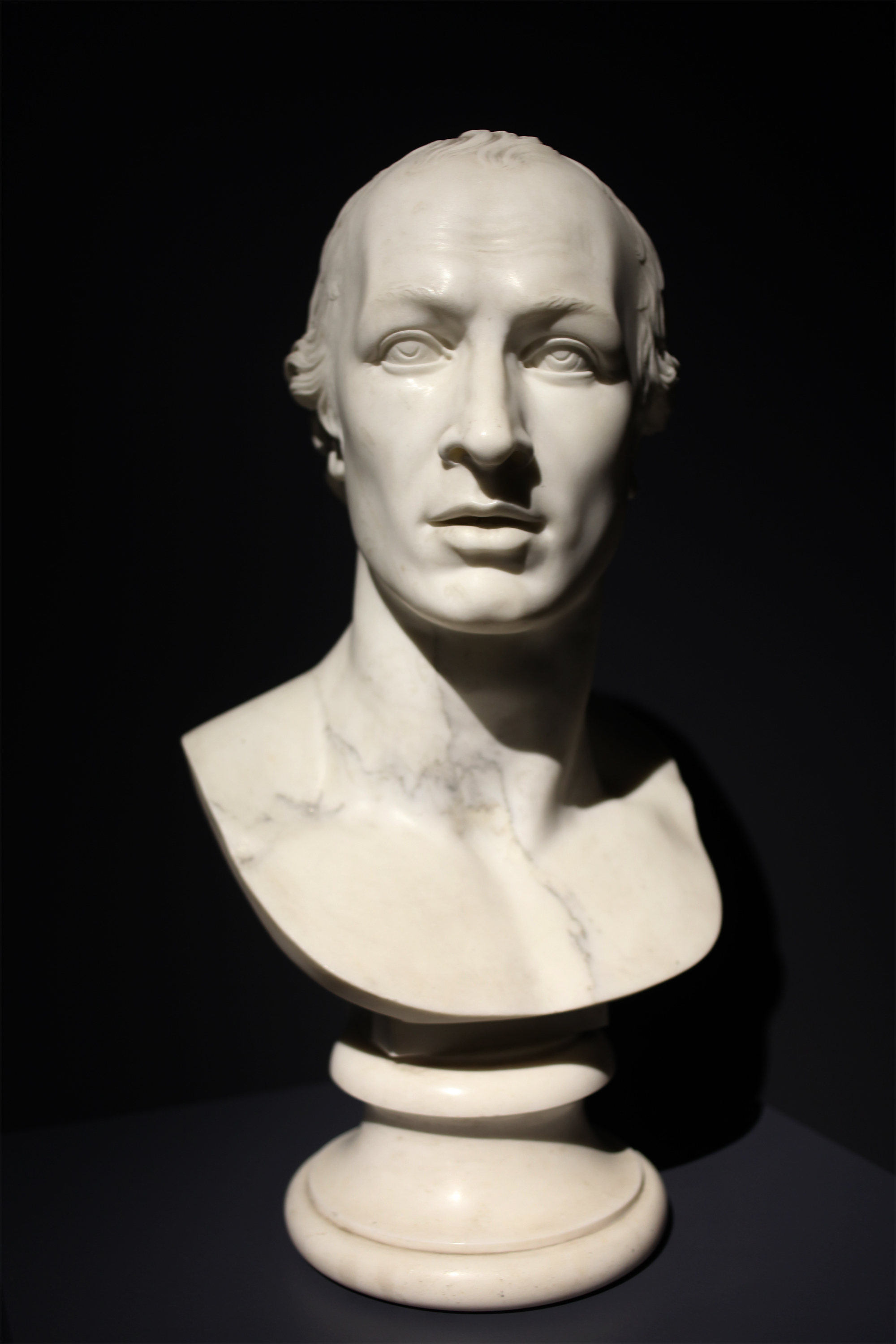 Antonio Canova (1757-1822) Giovanni Battista Sartori (1822 ca.); marmo. Collezione privata. Fotografata alla mostra "Canova-Thorwaldsen" presso le Galleria di Italia di Milano.